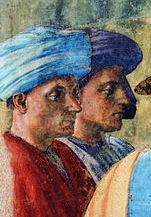 detail(restaurato)